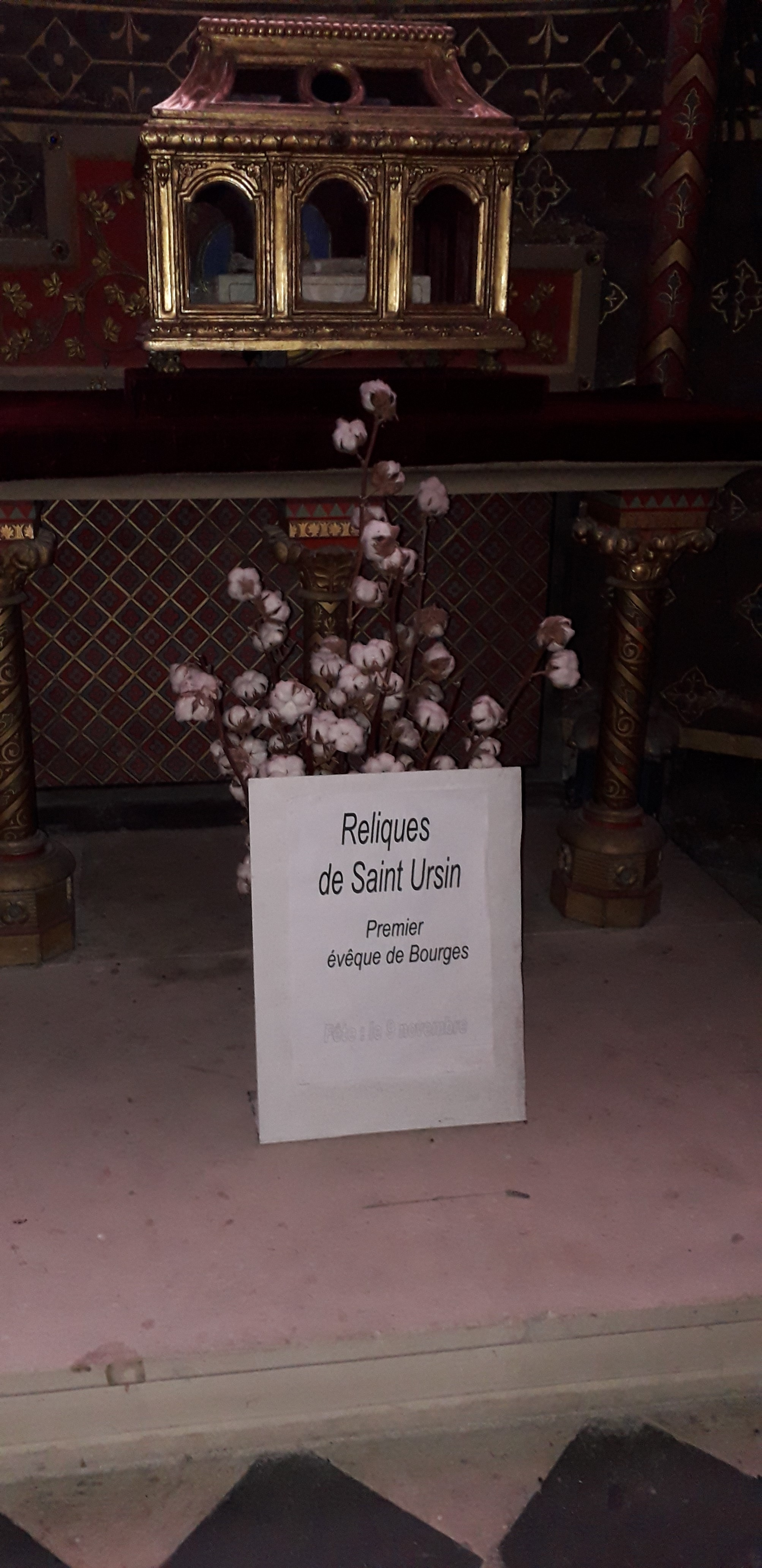 Saint Ursin premier évèque de Bourges